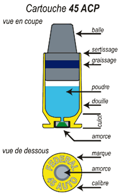 Dessin d'une cartouche de 45 ACP balle - plomb semi-wadcutter 200 grains Dessin de ma création : Pep.per 18 octobre 2006 à 14:13 (CEST)